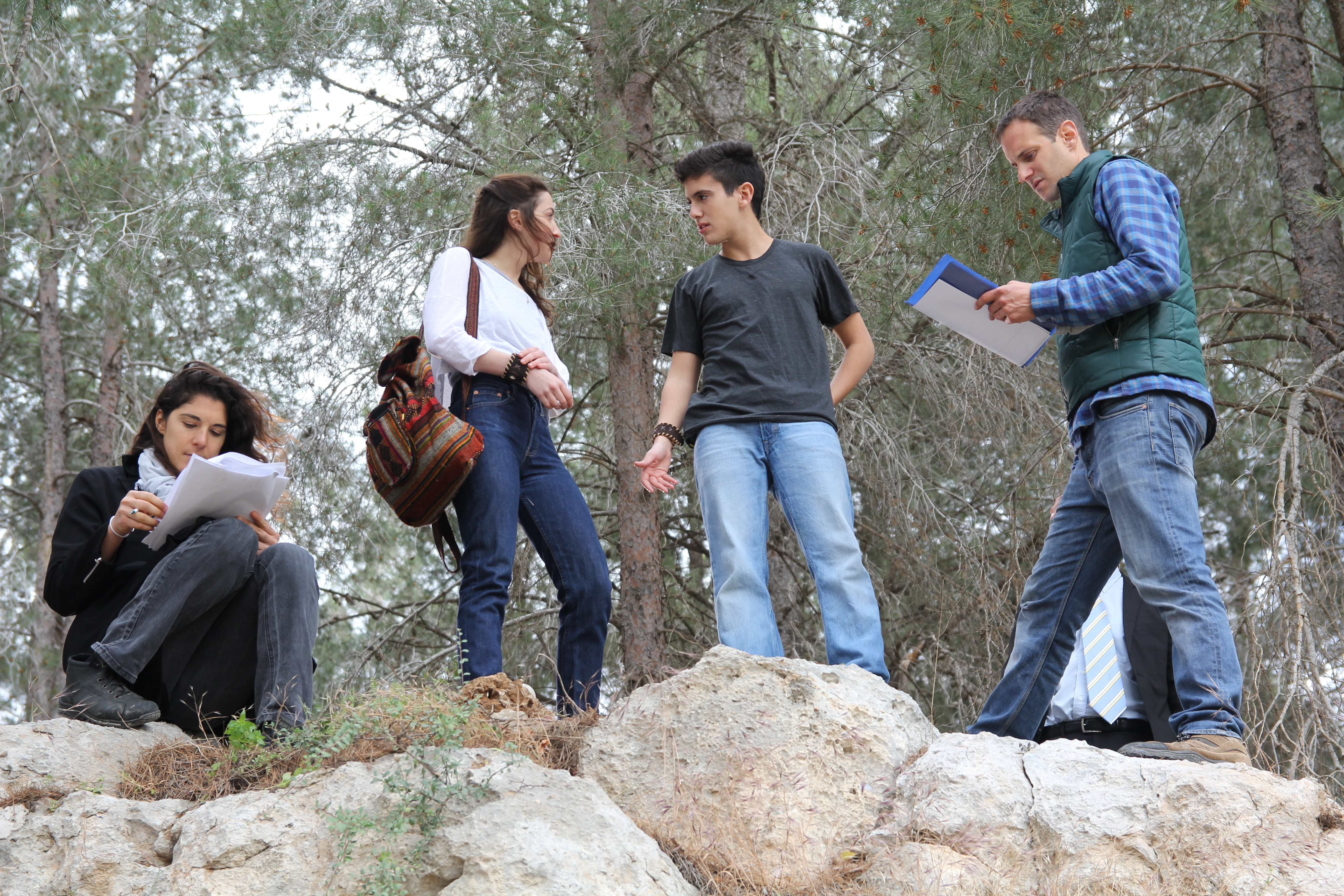 תמונה מתוך הסט של סדרת הטלוויזיה גאליס